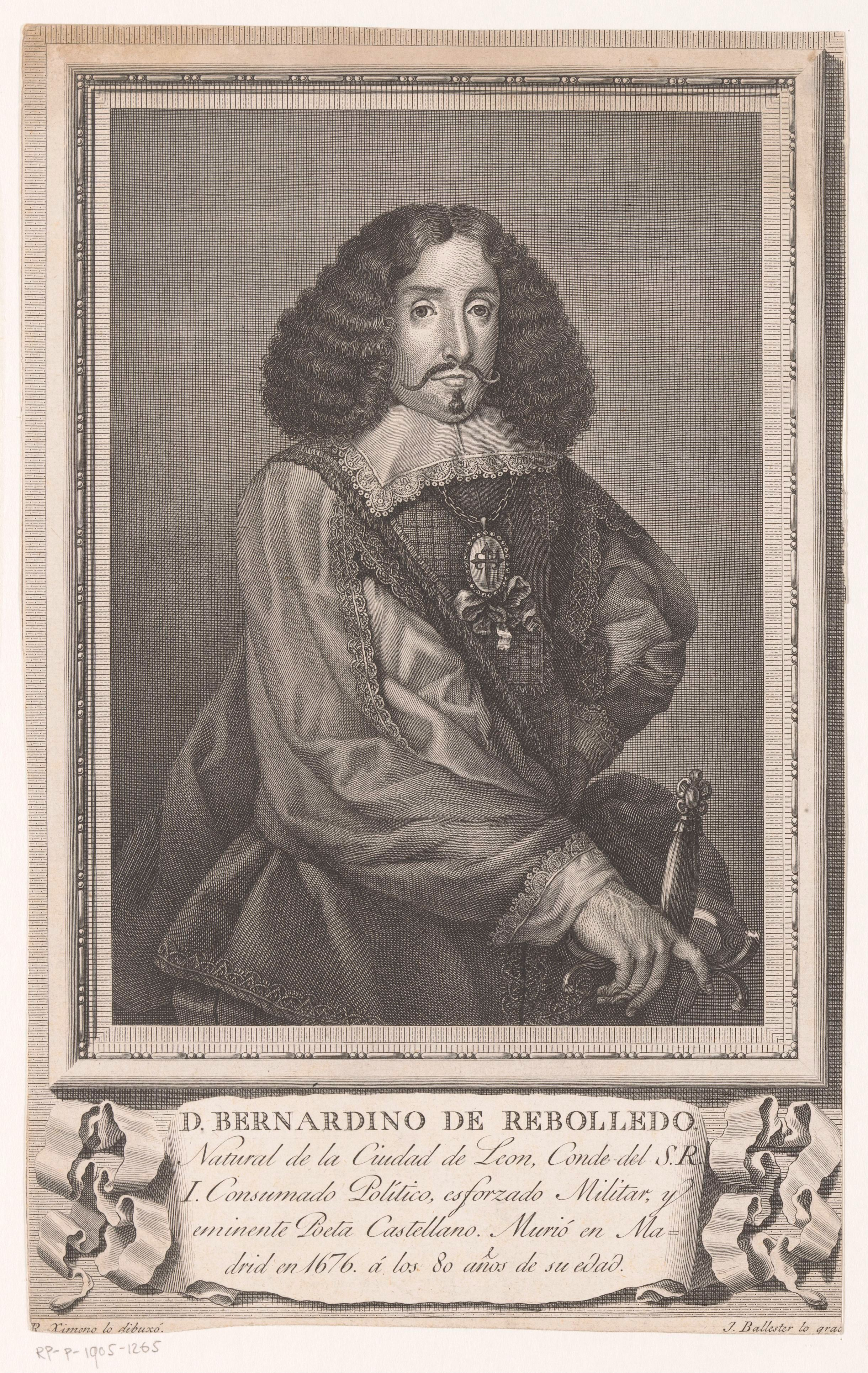 IdentificatieTitel(s): Portret van Bernardino de RebolledoObjecttype: prent Objectnummer: RP-P-1905-1265Opschriften / Merken: verzamelaarsmerk, verso, gestempeld: Lugt 2228Omschrijving: Naam van de geportretteerde en vierregelige Spaanse tekst in ondermarge.VervaardigingVervaardiger: prentmaker: Joaquín Ballester Ballester (vermeld op object)naar tekening van: Rafael Ximeno y Planes (vermeld op object)Plaats vervaardiging: SpanjeDatering: 1750 - 1808Materiaal: papier Techniek: etsen / graveren (drukprocedé)Afmetingen: blad: h 292 mm (binnen plaatrand afgesneden) × b 183 mm (binnen plaatrand afgesneden)OnderwerpWat: historical personswriter, poet, authorWie: Bernardino de RebolledoVerwerving en rechtenVerwerving: aankoop 1905Copyright: Publiek domein